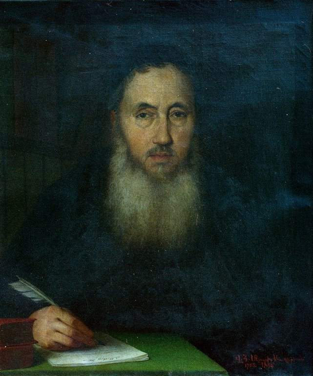 Армянский ученый Мкртич Авгерян (1762—1854)